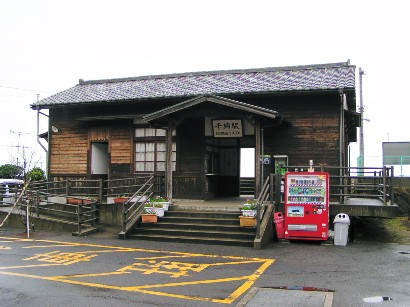 2005年3月27日に投稿者が千綿駅にて撮影。